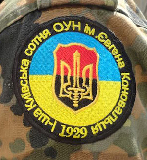 1-а Київська сотня ім. Євгена Коновальця добровольчого батальйону «ОУН». Батальйон «ОУН» знаходиться у складi ДУК «Правого сектору».